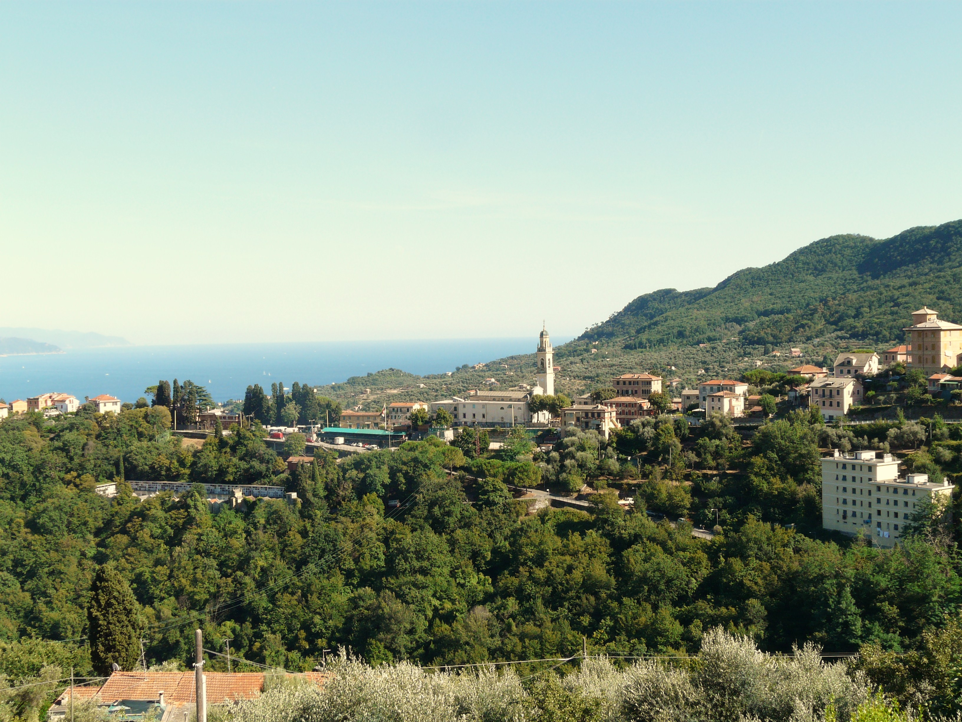 San Lorenzo della Costa, Santa Margherita Ligure, Liguria, Italia